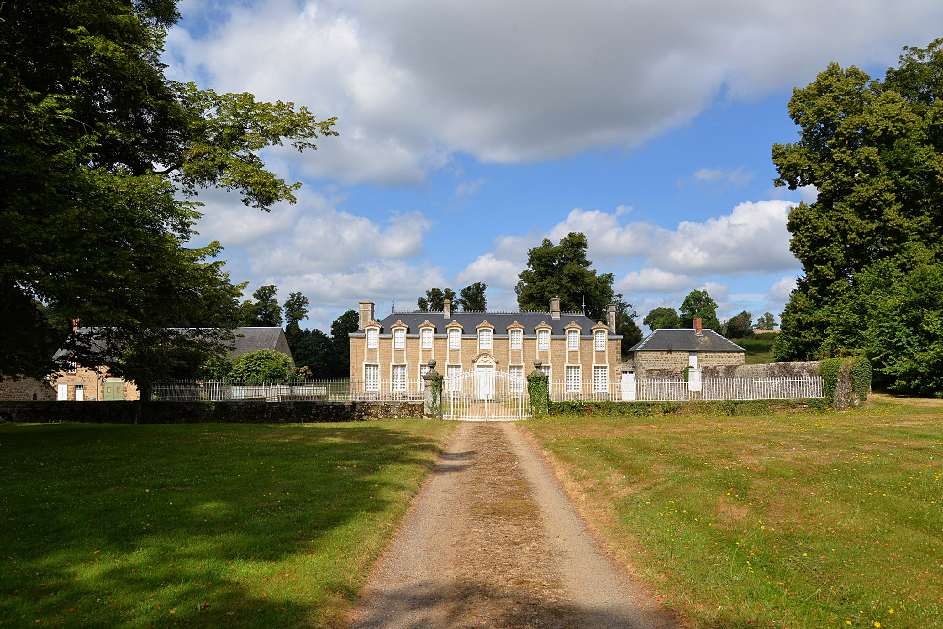 Les Rotours (Orne)